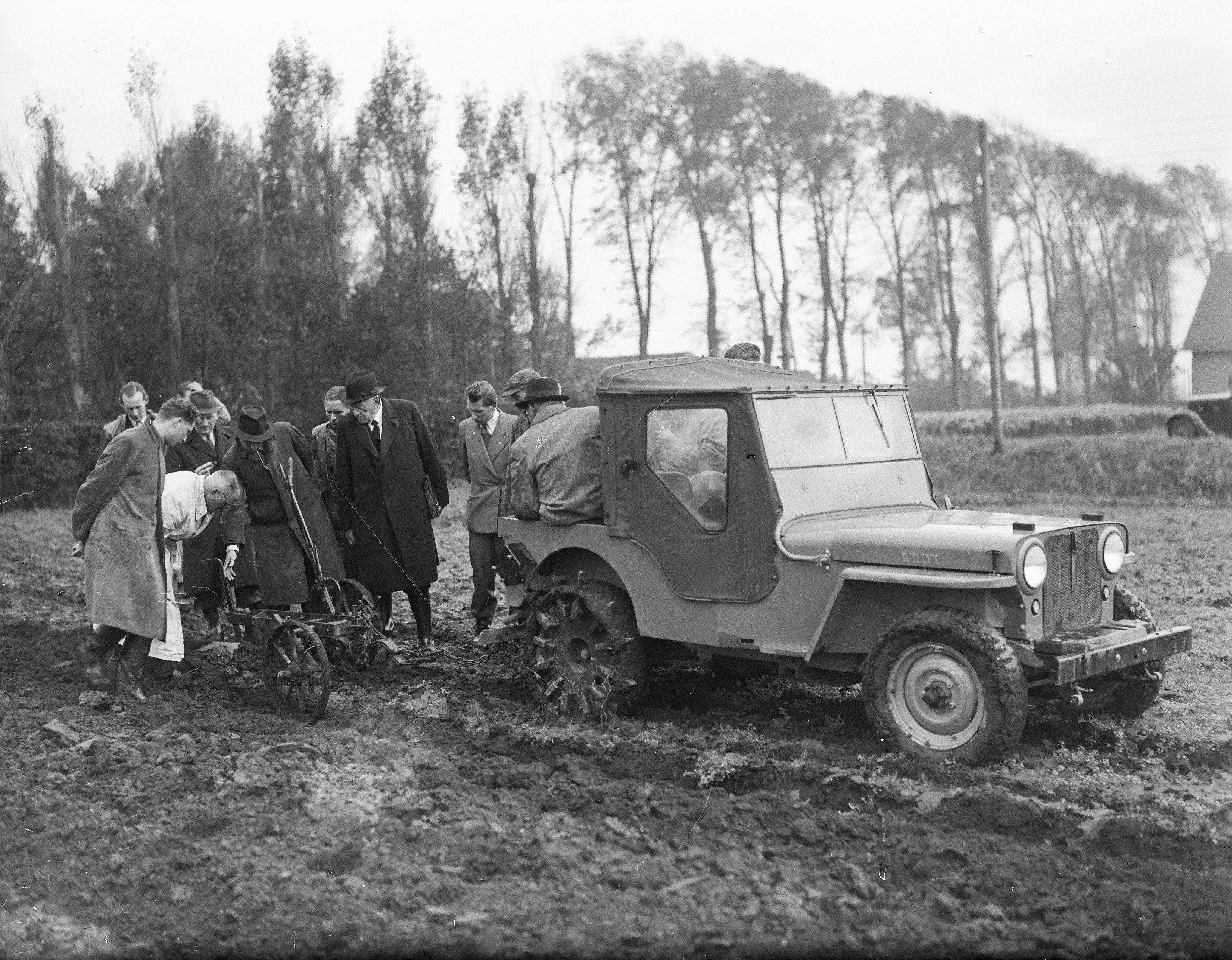 Collectie / Archief : Fotocollectie Anefo Reportage / Serie : [ onbekend ] Beschrijving : Jeeps voor landbouw en industrie Datum : 4 oktober 1946 Trefwoorden : INDUSTRIE, JEEPS, landbouw Fotograaf : Fotograaf Onbekend / Anefo Auteursrechthebbende : Nationaal Archief Materiaalsoort : Glasnegatief Nummer archiefinventaris : bekijk toegang 2.24.01.09 Bestanddeelnummer : 901-9334